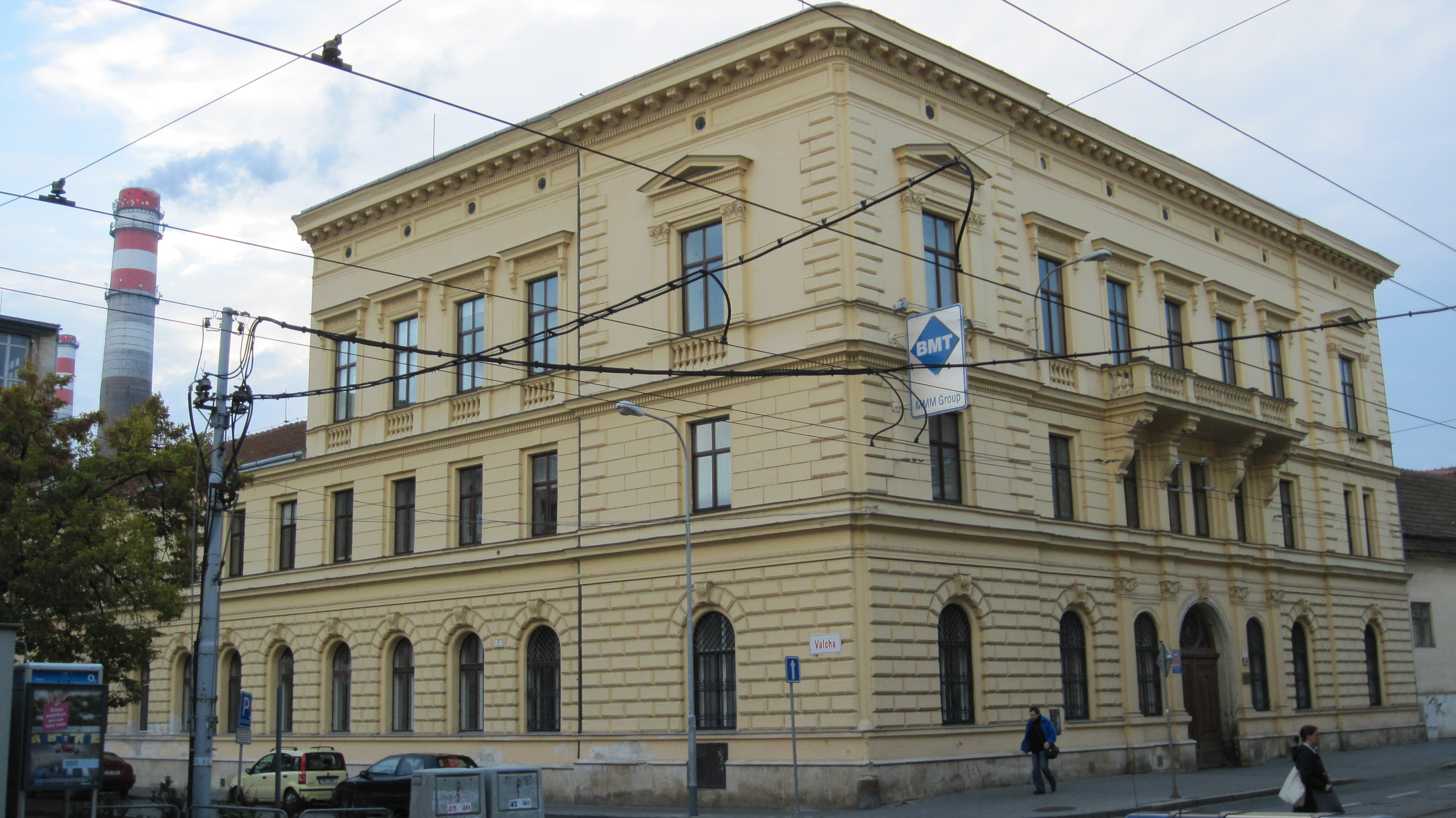 Palác Gustava Adolfa Schoellera, Josef Arnold 1868. Brno, Cejl 50